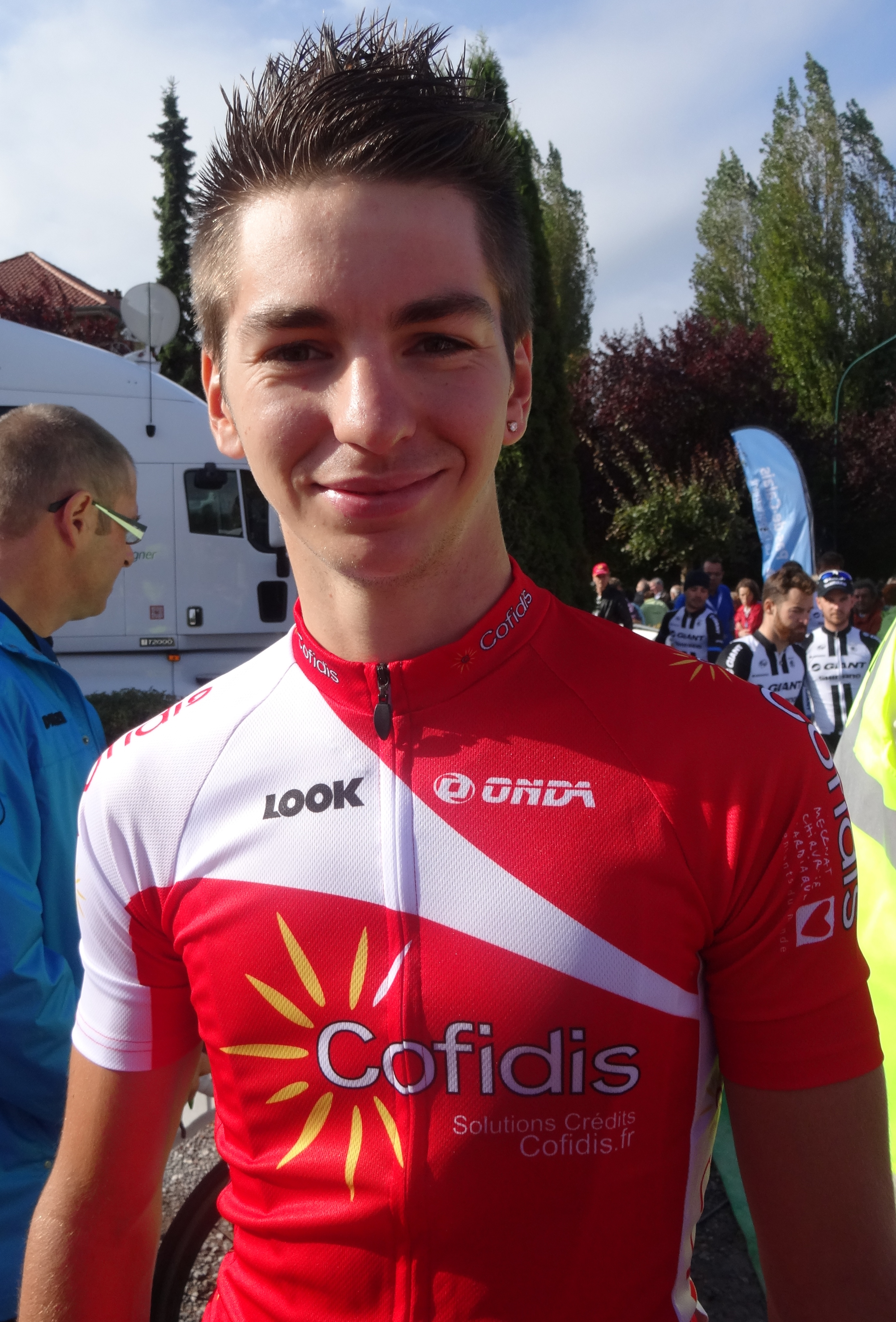 Reportage réalisé le dimanche 21 septembre à l'occasion du départ et de l'arrivée du Grand Prix d'Isbergues 2014 à Isbergues, Nord-Pas-de-Calais, France.